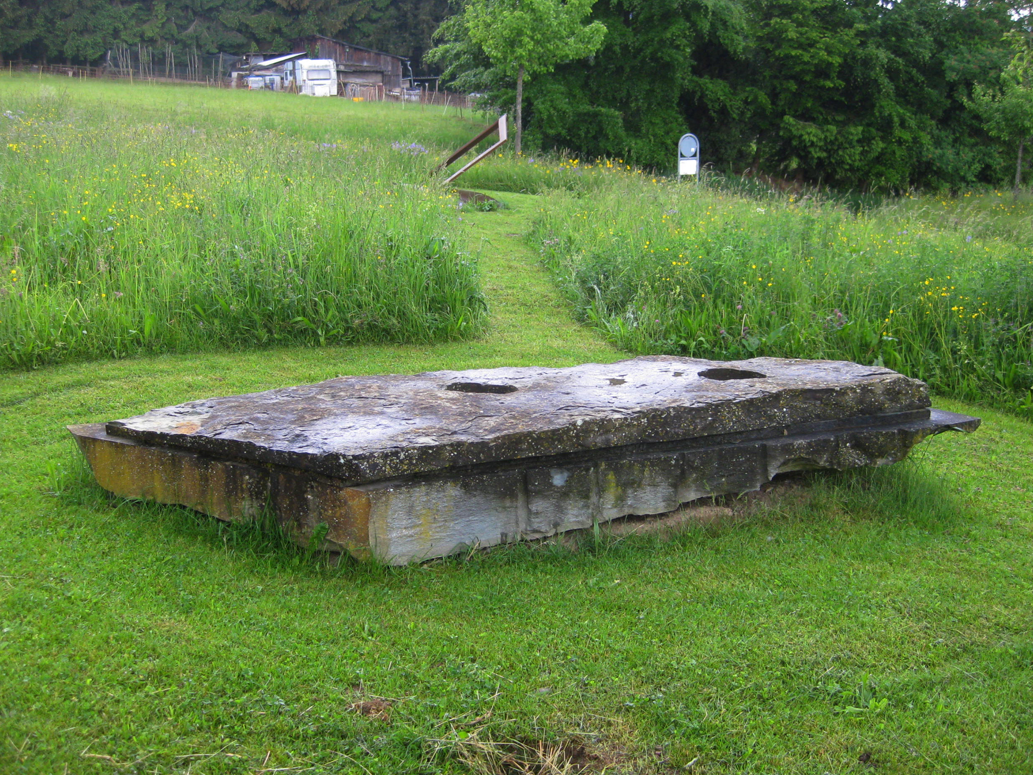 Alf Setzer, o. T., 2002, - Deutschland, Baden-Württemberg, Rottweil-Hausen, KUNSTdünger Skulpturenfeld